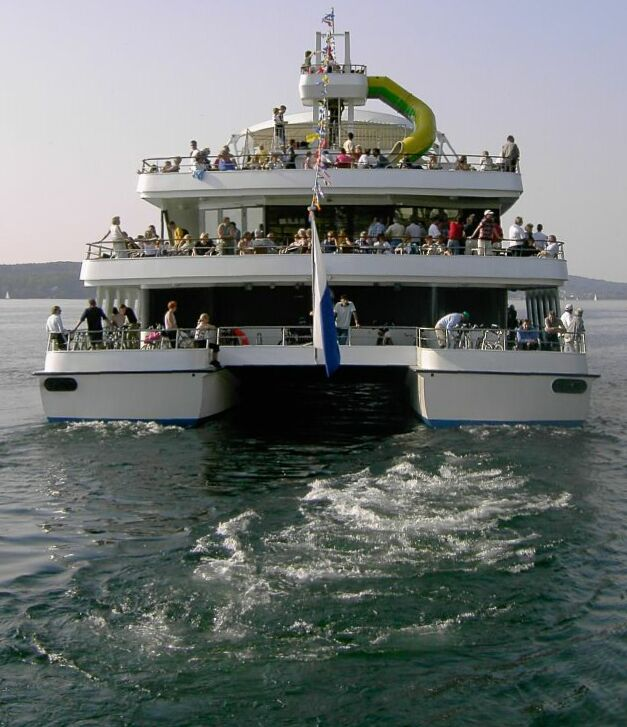 MS Starnberg, im Betrieb als Kursschiff auf dem Starnberger See, selbst fotografiert, GNU-FDL